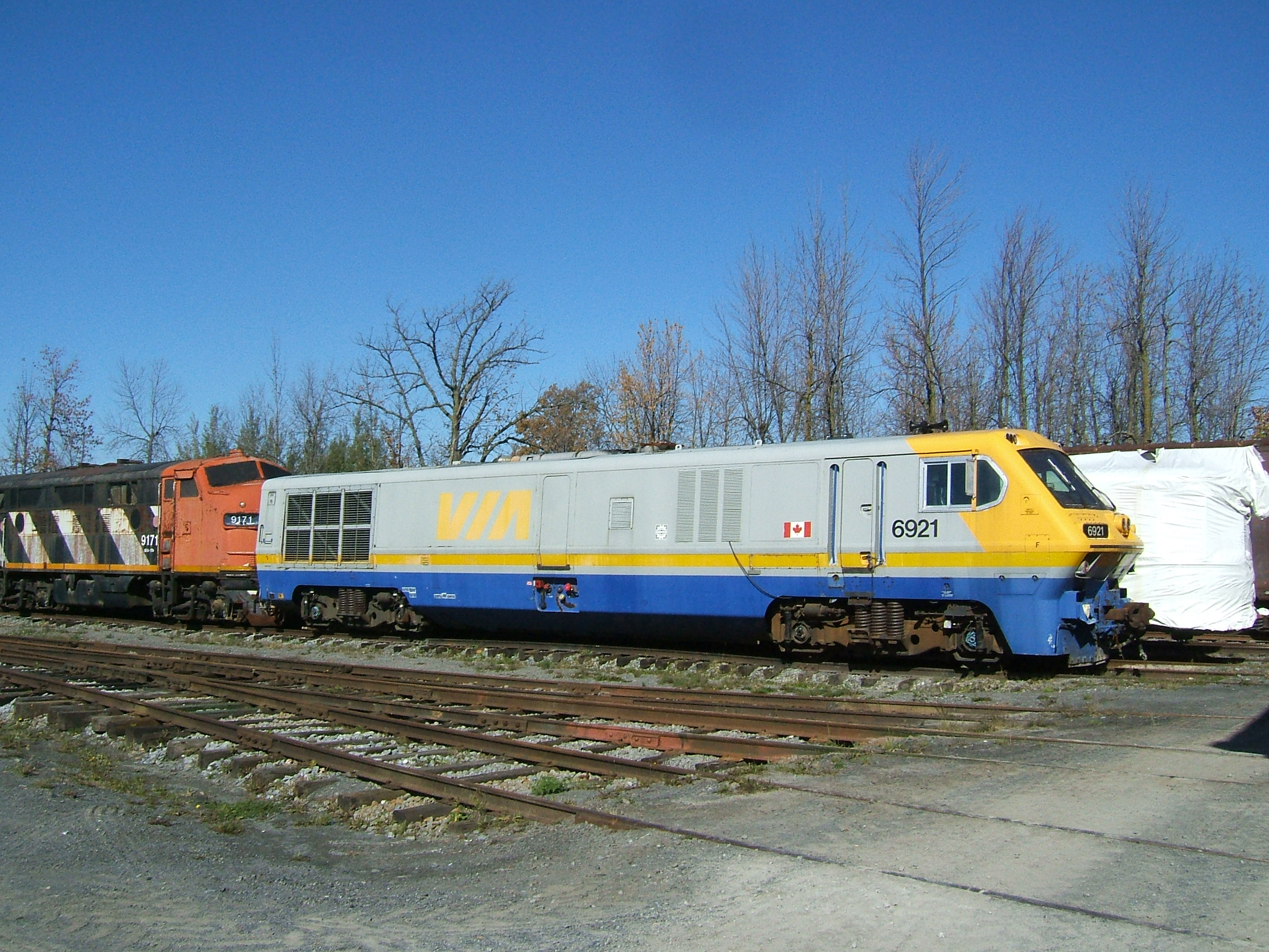 Canadian Railroad Museum, Saint-Constant, Québec